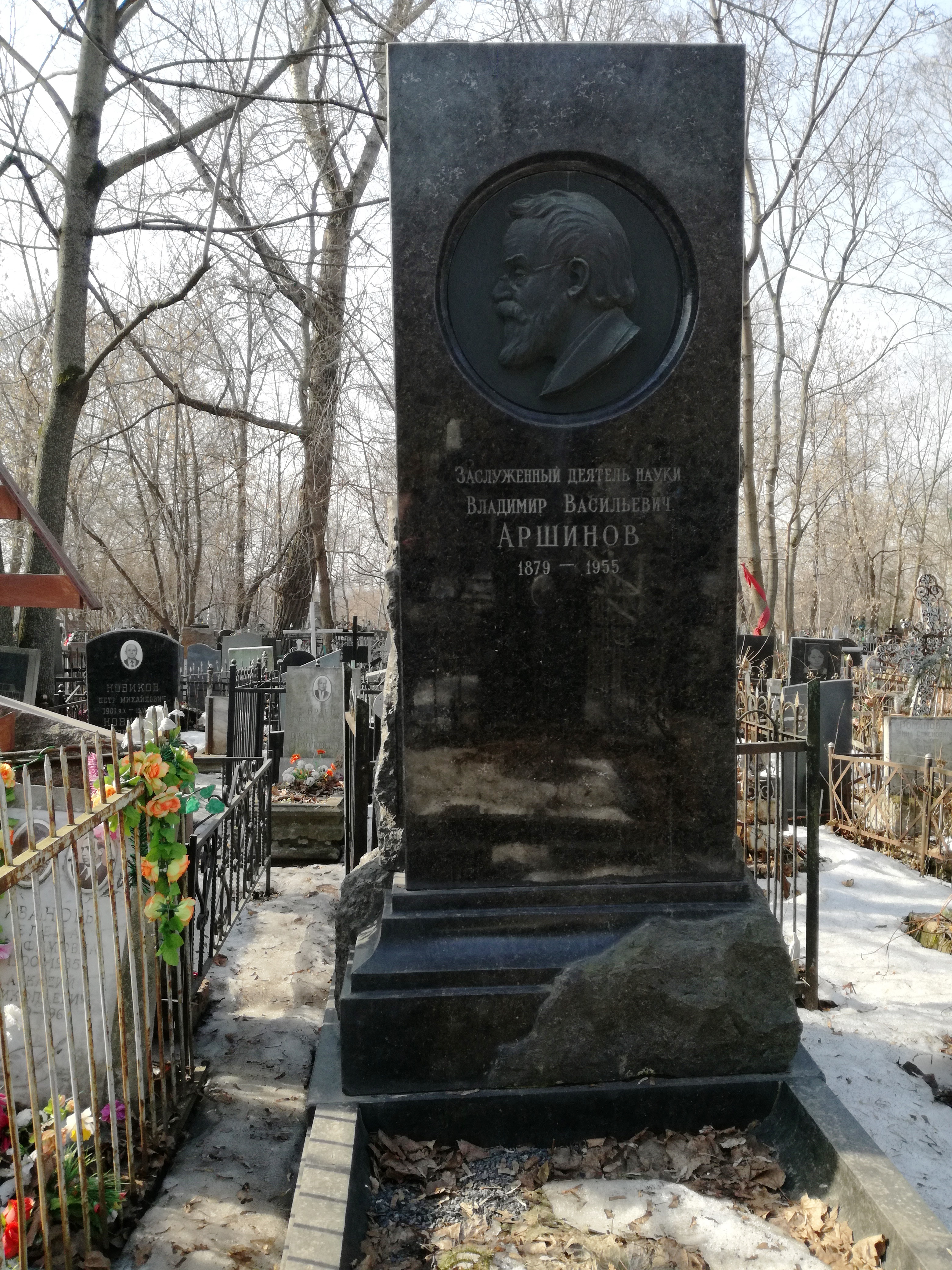 Даниловское кладбище